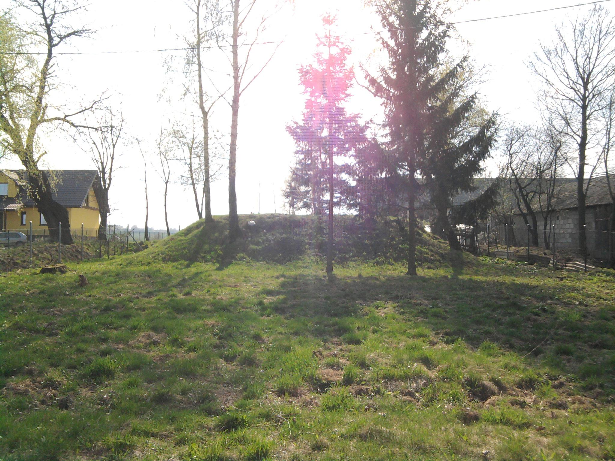 Mogiła zbiorowa na zachodnim cmentarzu wojennym z I wojny światowej w Piotrkowie Pierwszym.